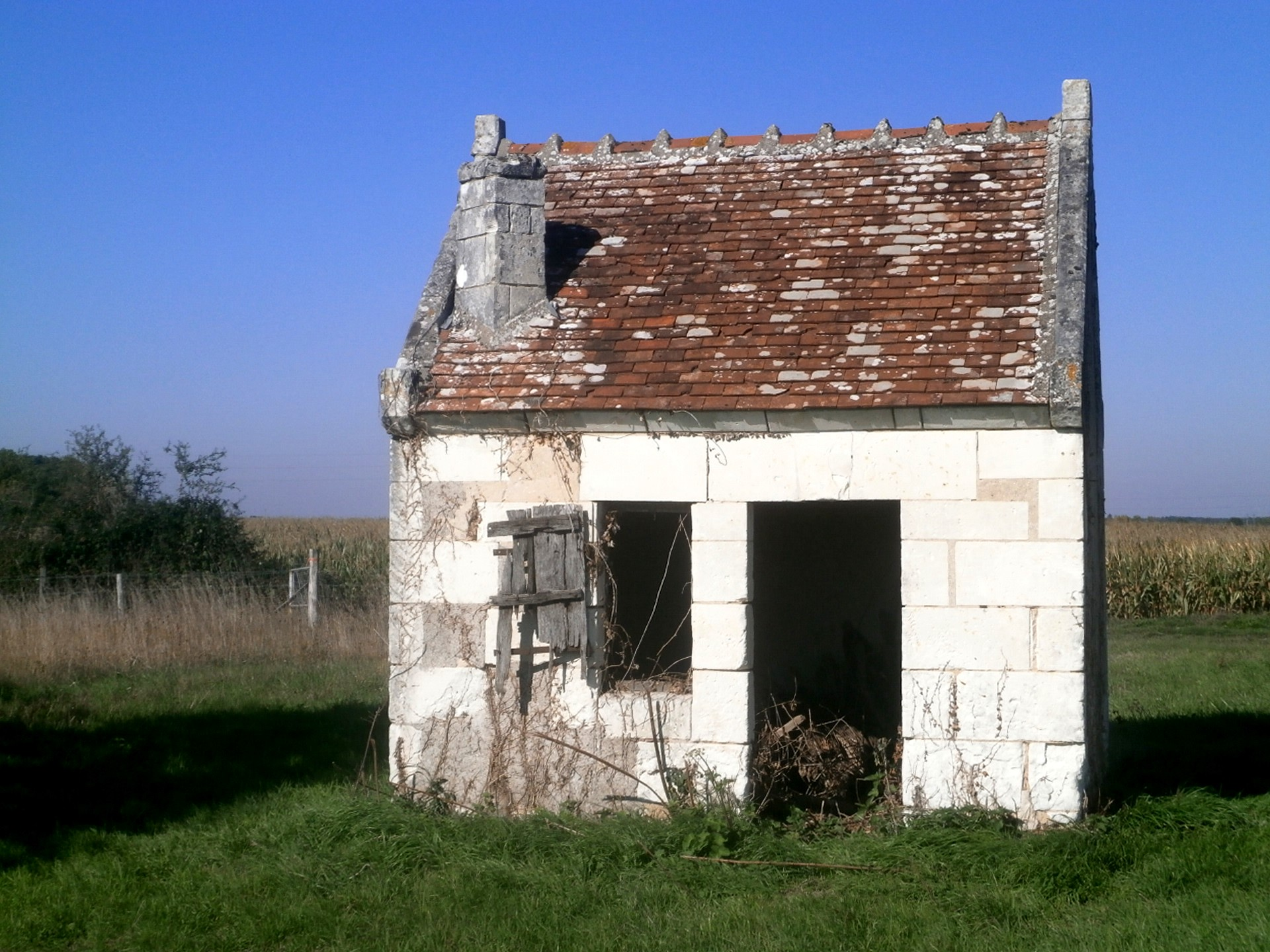 Ancienne loge de vigne à Chédigny